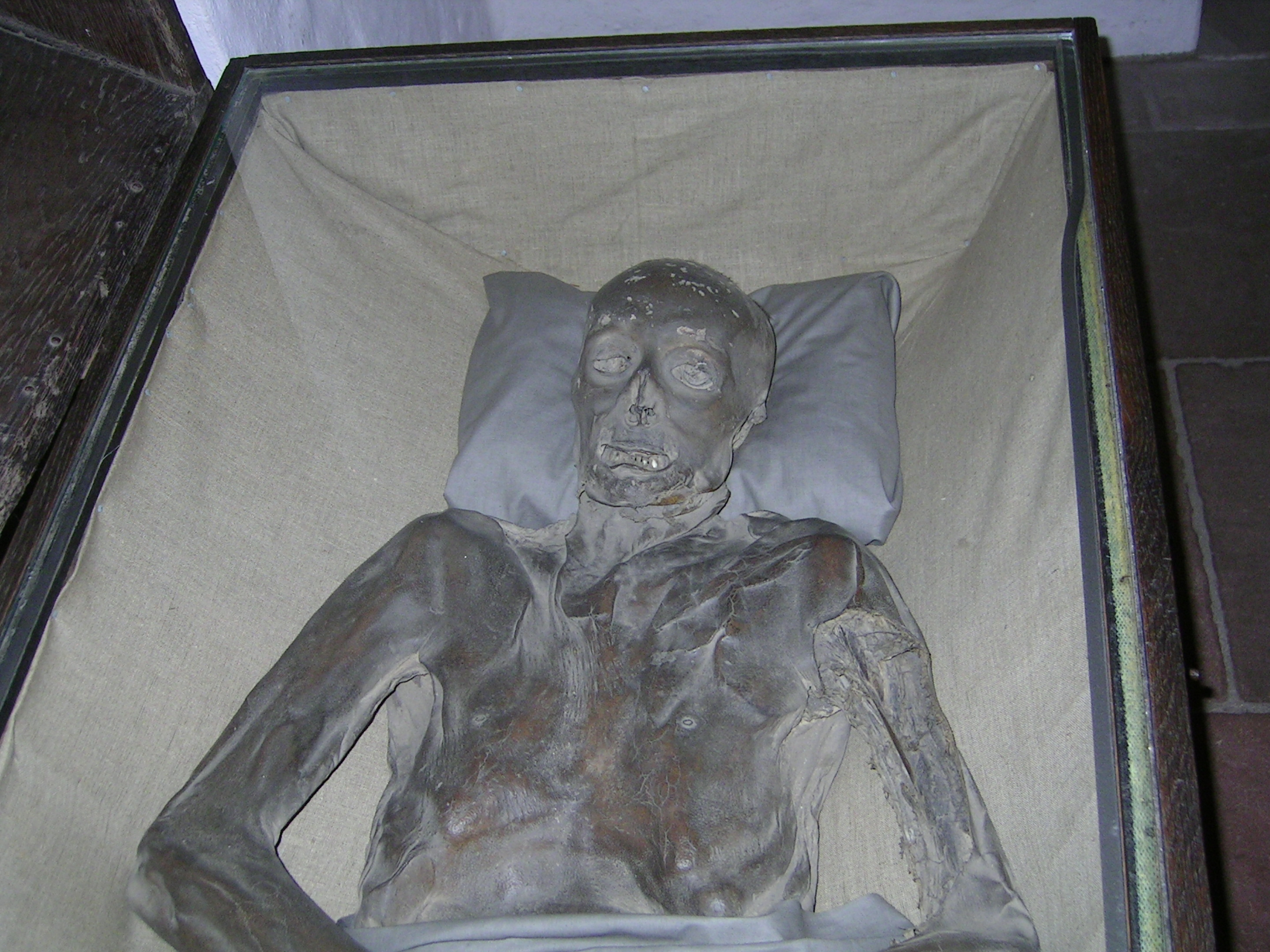 St Petri Dom mummies